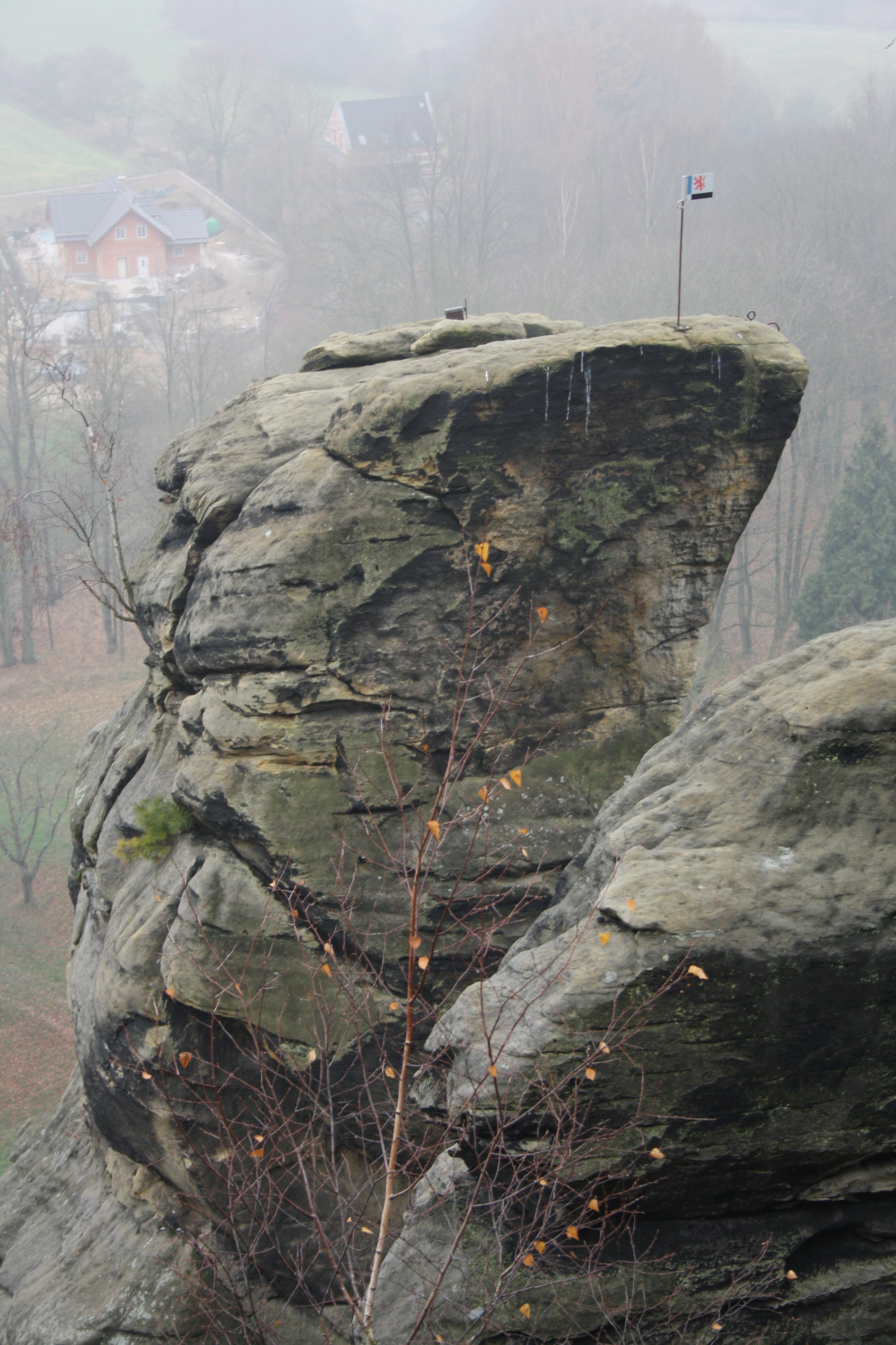 Svojkovské skály - nejzápadnější skalní věž zvaná Matterhorn